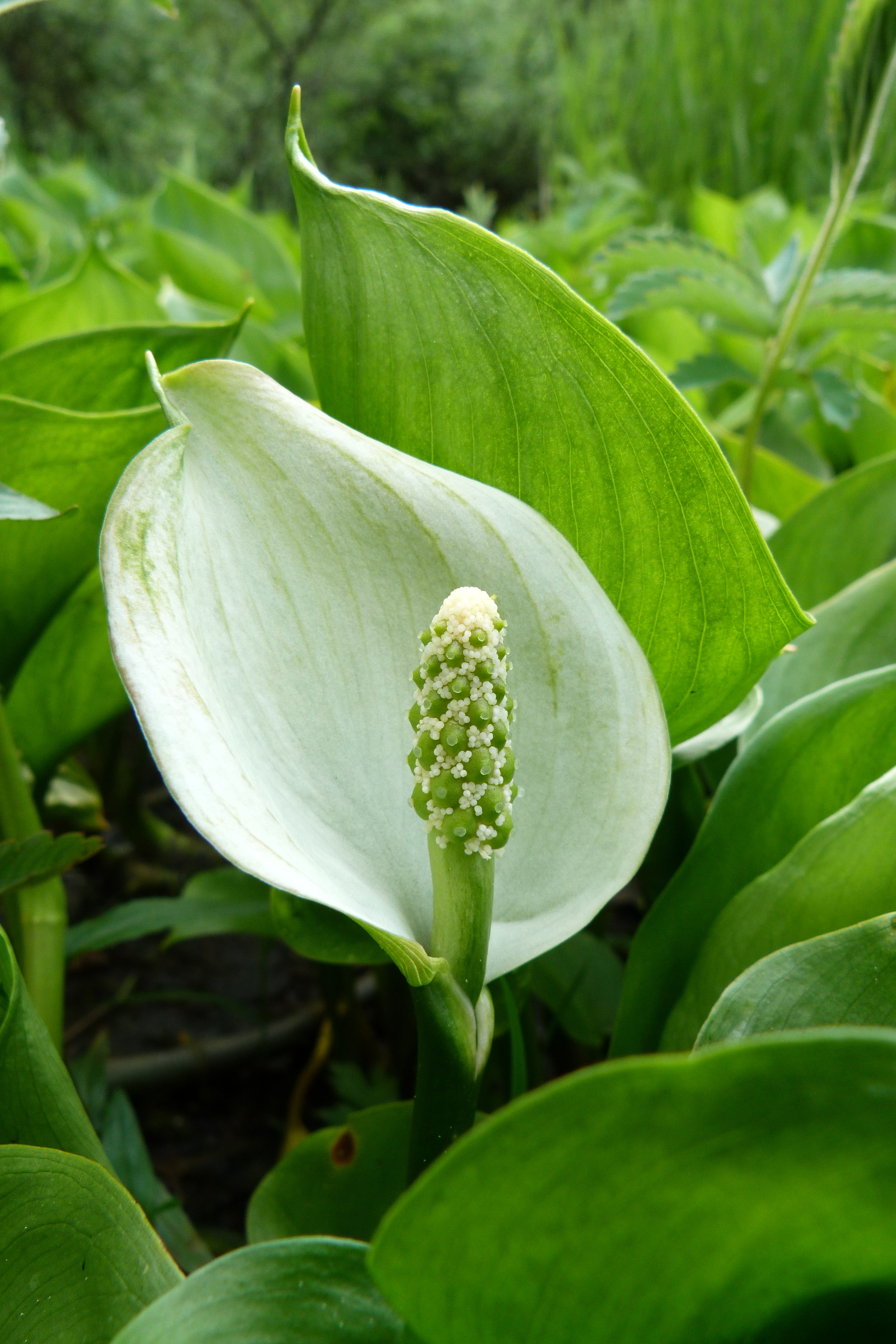 Calla des marais (Calla palustris) à Retournemer, Vosges.